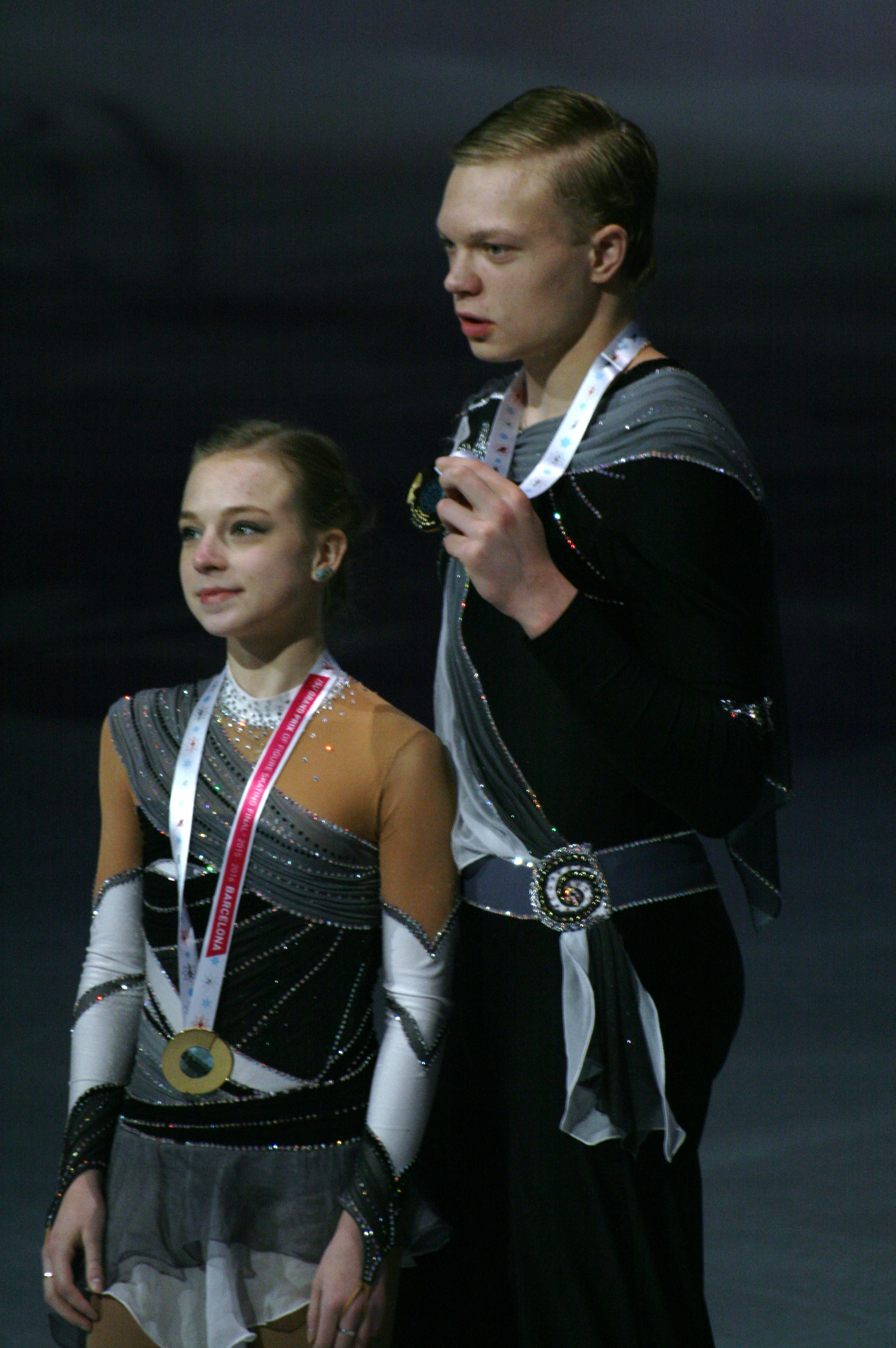 Екатерина Борисова и Дмитрий Сопот (Россия) - 1е место на церемонии награждения победителей и призёров в парном катании на на финале Гран-при по фигурному катанию среди юниоров 2015-2016.